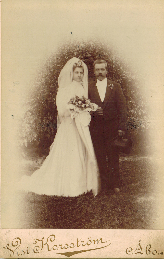 Aline ja Karl Johnssonin hääkuva